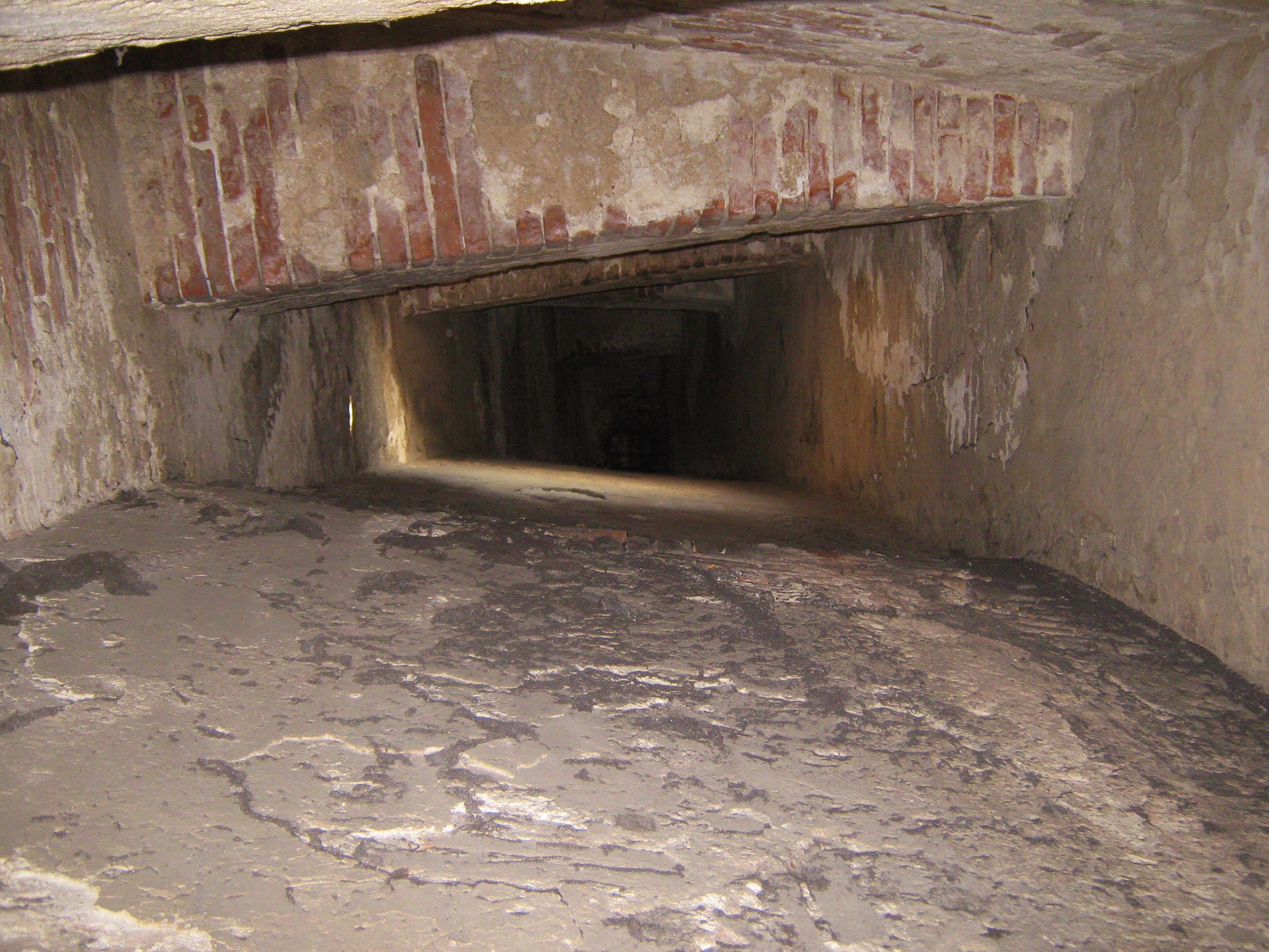 Firenze, cupola del Brunelleschi: veduta dell'intercapedine che corre tra la cupola esterna ed interna, con i costoloni verticali e le nervature orizzontali.